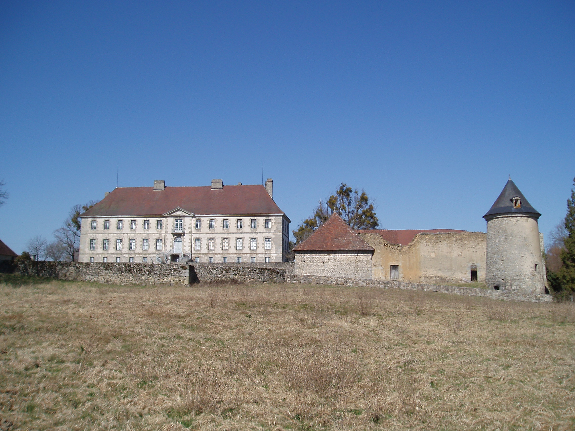 Château